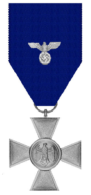 Kruis voor 20 jaar dienst Marine en landmacht van Duitsland 1936 - 1945